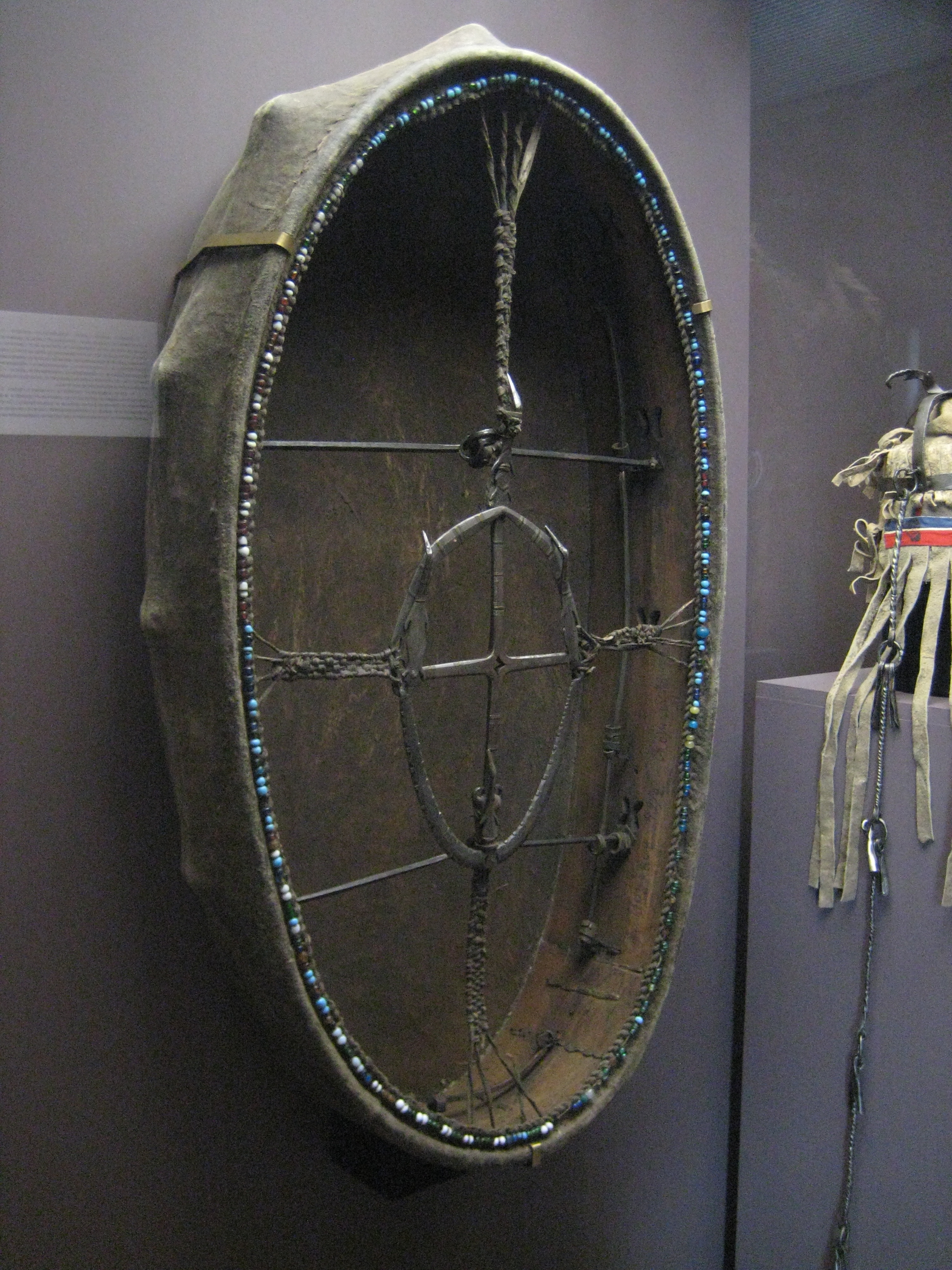 Тунгусы (эвенки). Бубен шаманский. Российская империя, конец 19-начало 20 века. Кожа, дерево, металл, бусы. Российский этнографический музей. Выставка "Путешествие Николая Александровича"